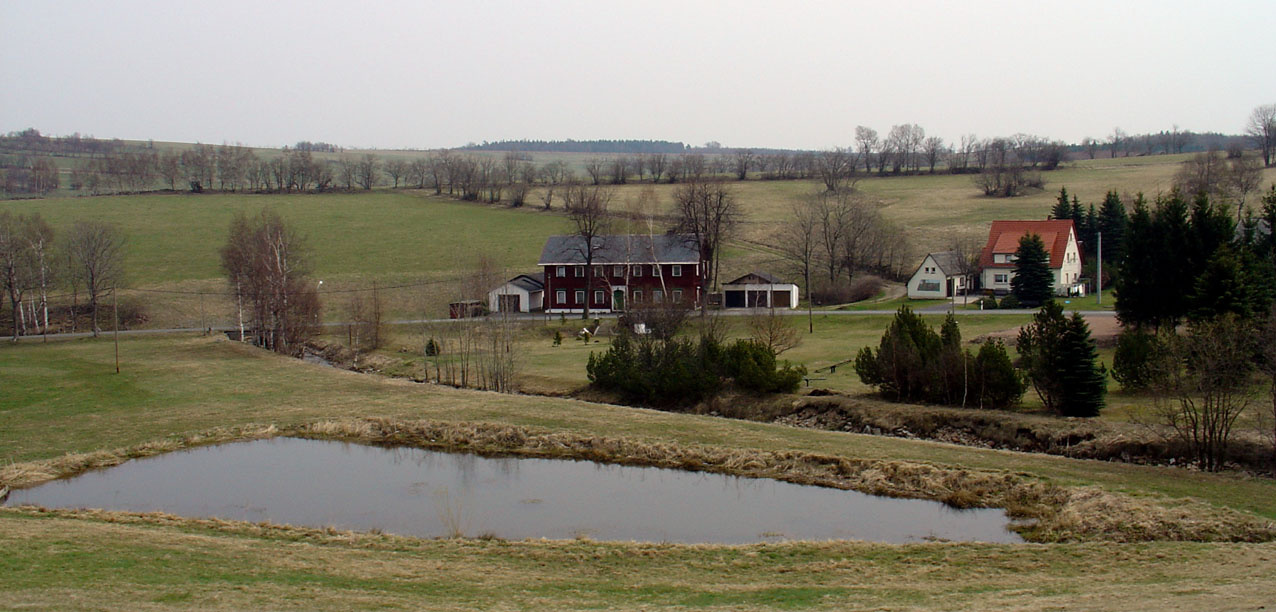 Müglitz (Sachsen, Erzgebirge): Zollhaus und Mühlenteich